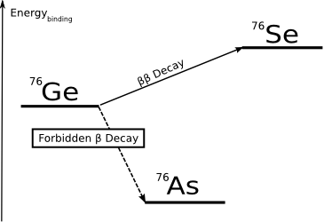 DBD-EnergyBindingLevels-Example